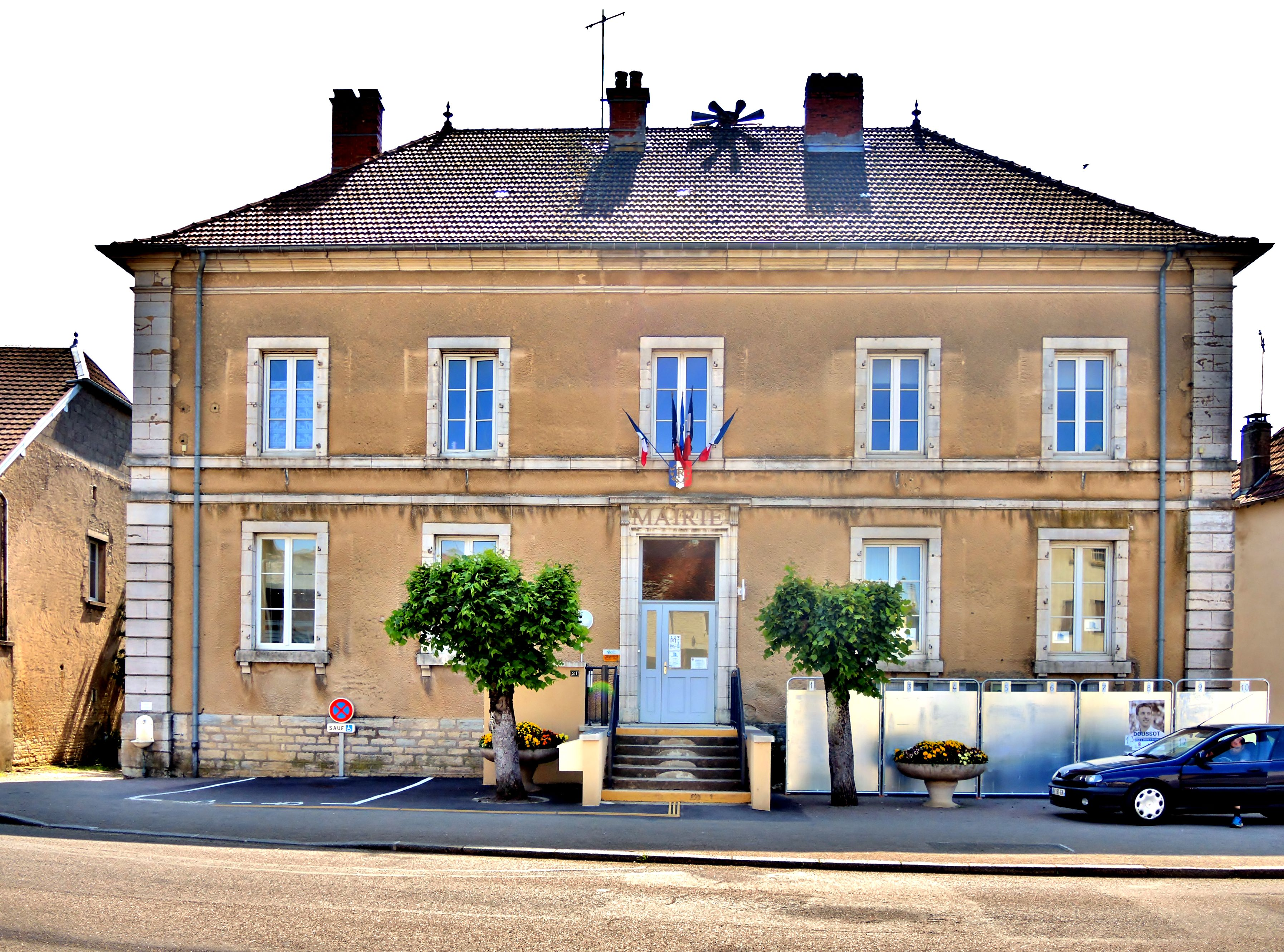 Mairie de Frétigney. Frétigney-et-Velloreille. Haute-Saône.